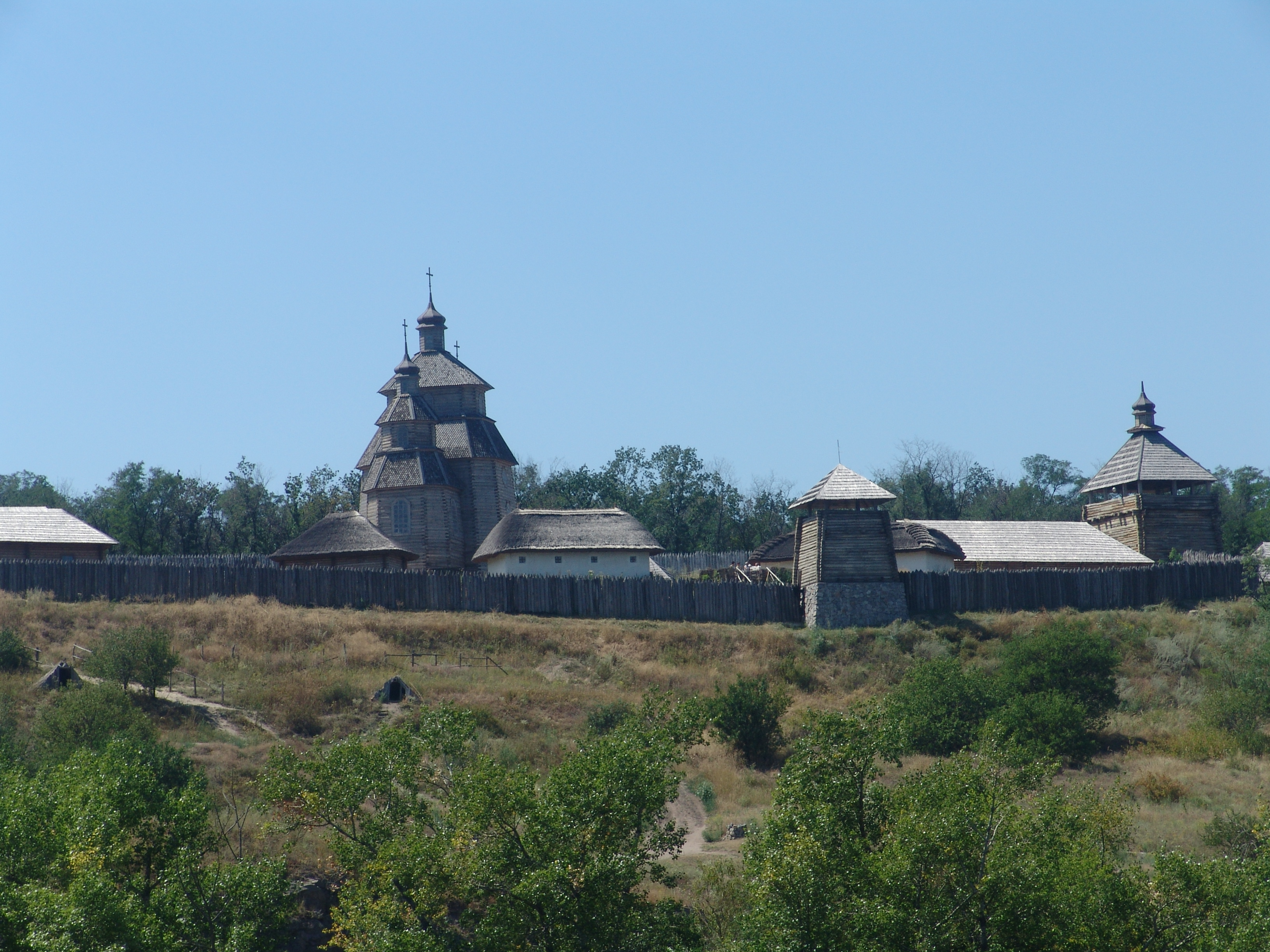 Хортица. Запорожская Сечь